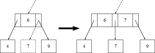 Beszúrás 2-3 fába - 2-csúcs eset